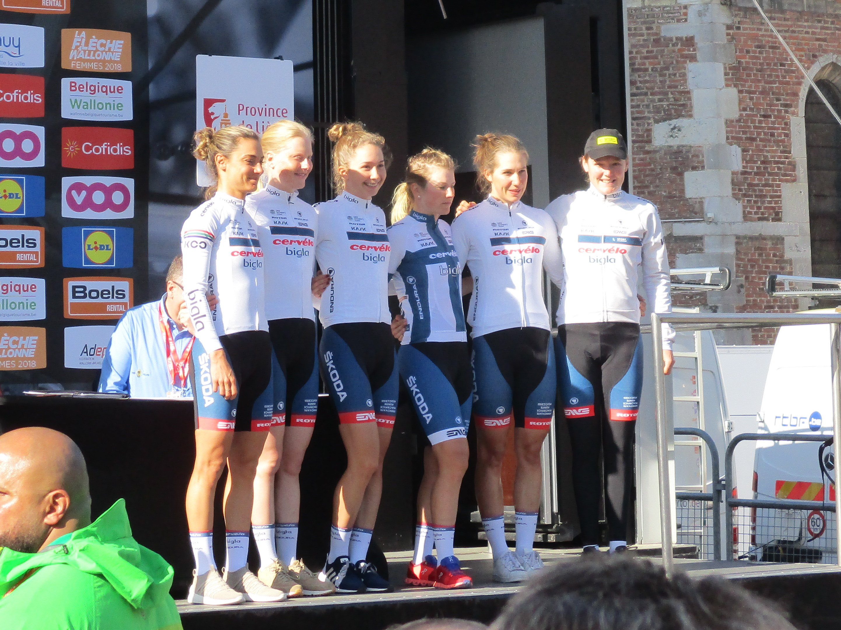 Start van de Waalse Pijl 2018 op de Mur van Huy.